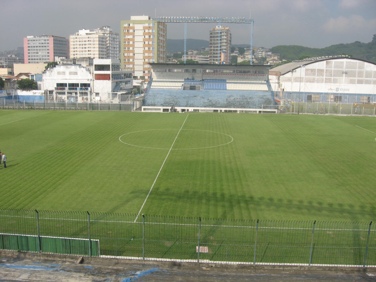 Estádio Mourão Filho, mais conhecido como Estádio da Rua Bariri, pertencente ao Olaria Atlético Clube, do bairro de Olaria, localizado na zona norte da cidade do Rio de Janeiro, Brasil.